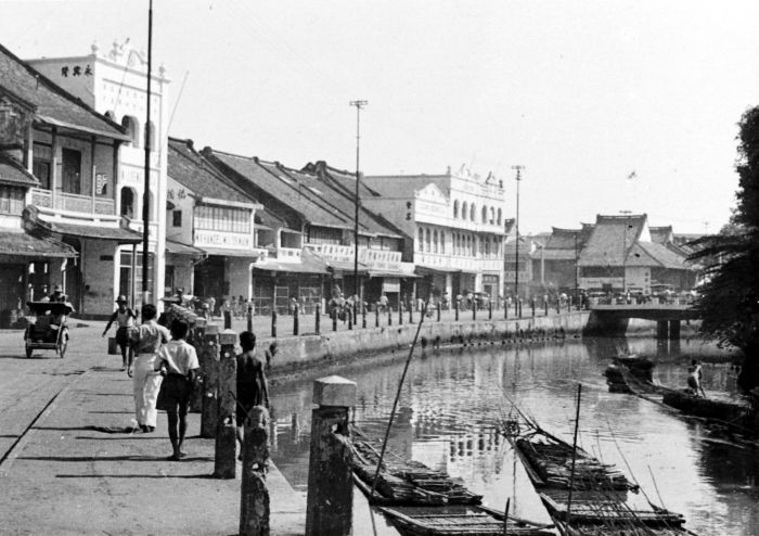 Repronegatief. Rivier Kali Besar in de benedenstad van Djakarta, West Java